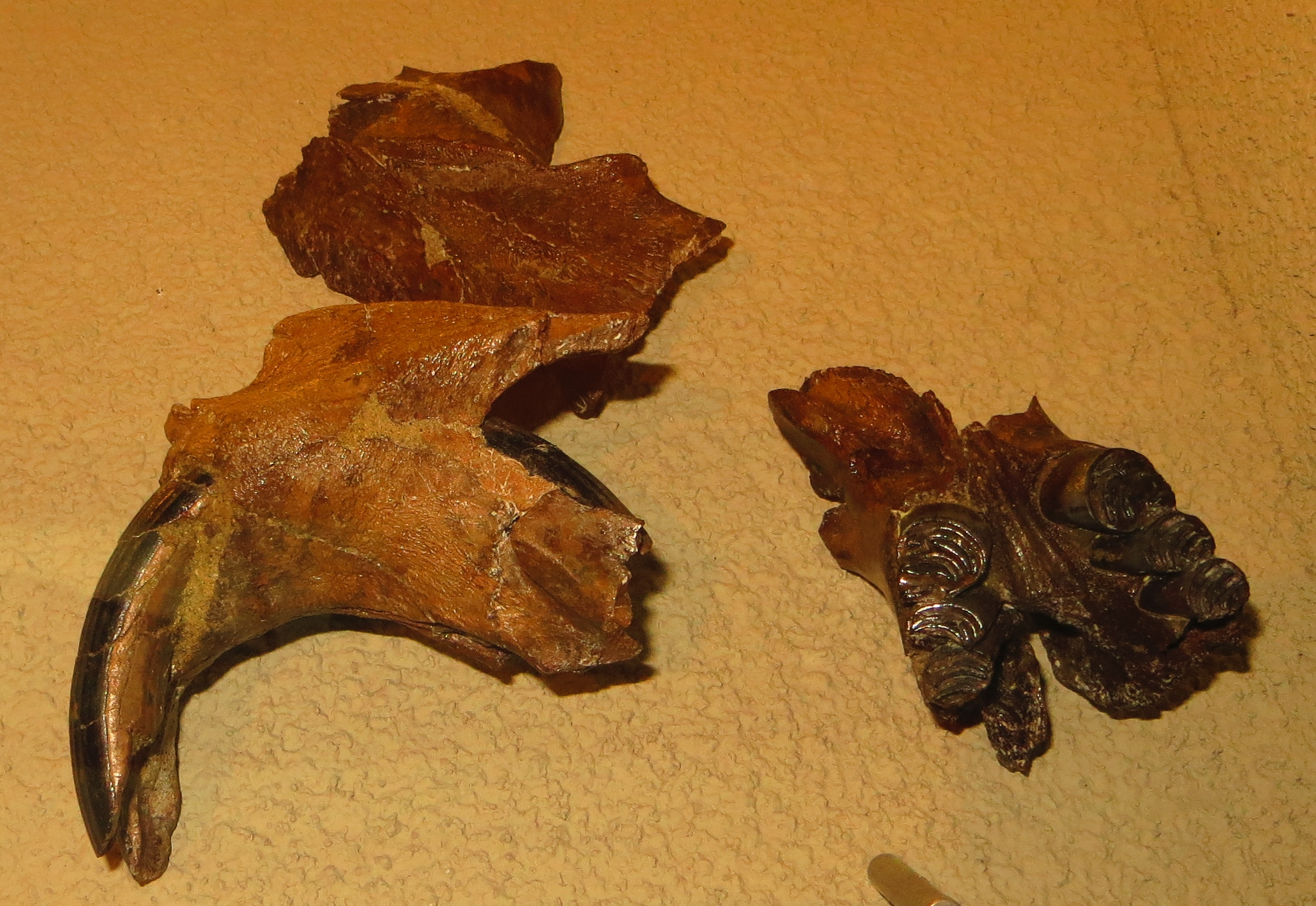 Fossil of Trogontherium, an extinct mammal - Took the picture at Naturalis, Leiden